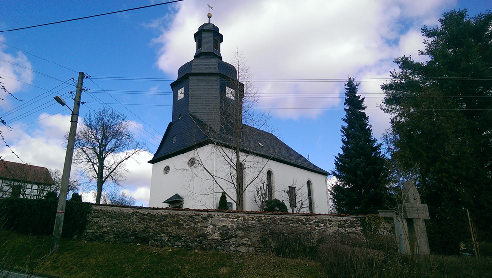 Die Johanniskirche in Schöndorf bei Schleiz